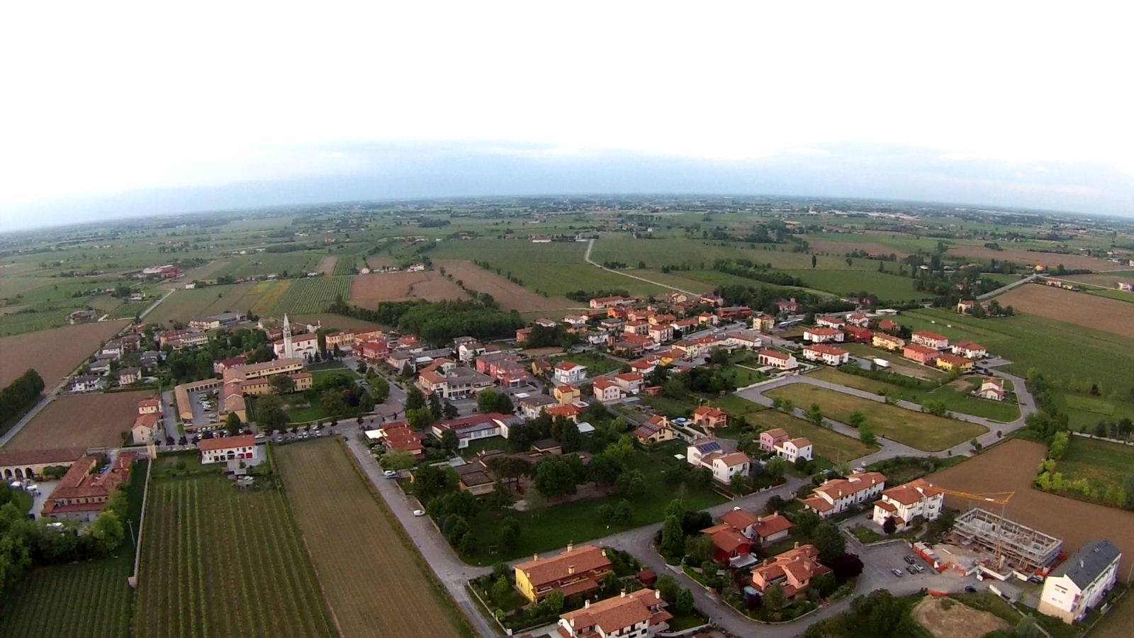 Campodipietra dall'alto